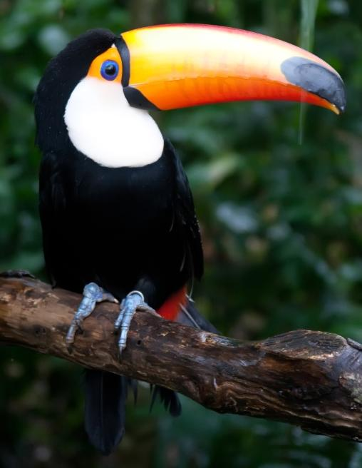 Ramphastos_toco